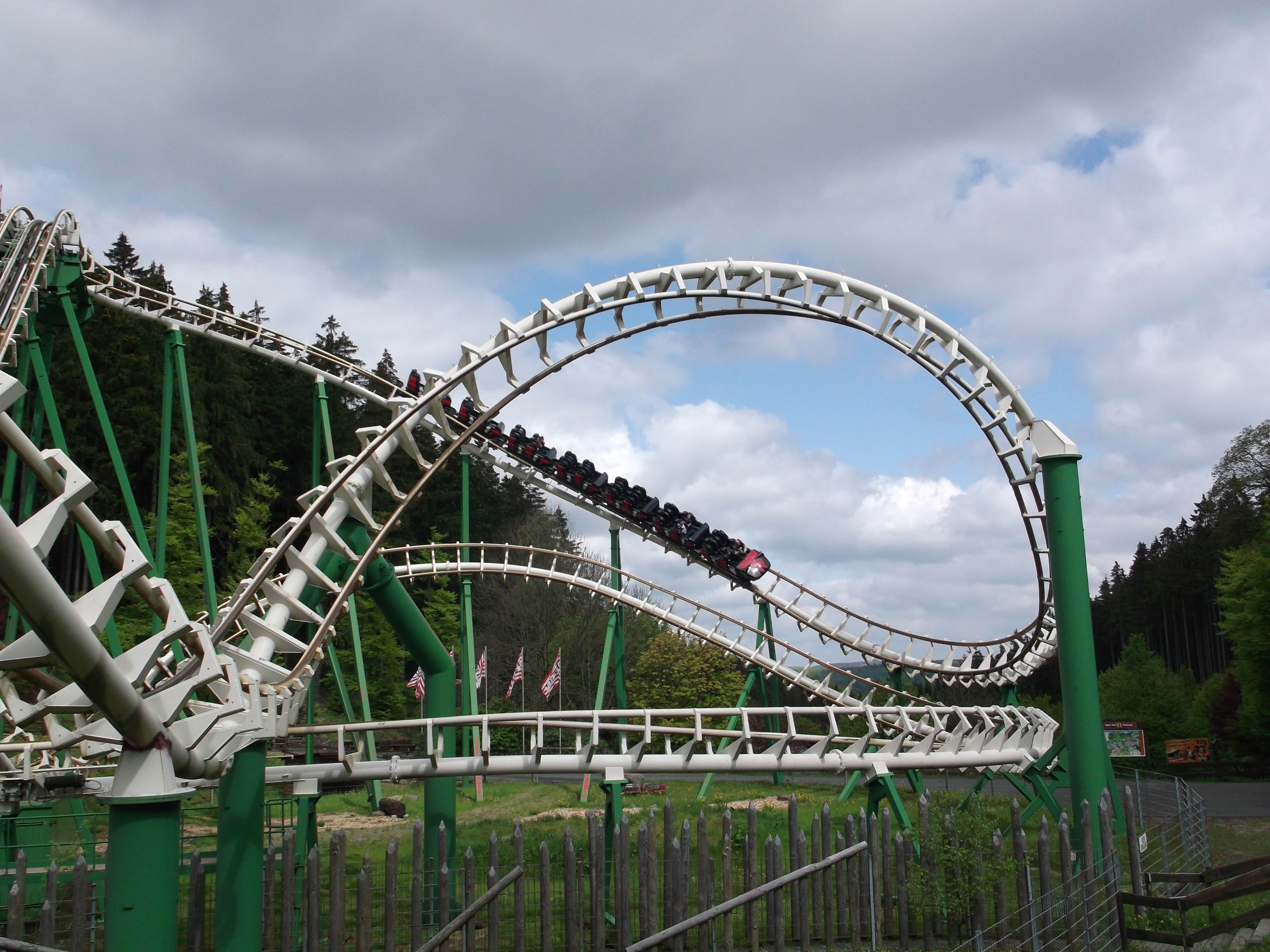 Die Stahlachterbahn "Speed Snake" im Freizeitpark Fort Fun Abenteuerland